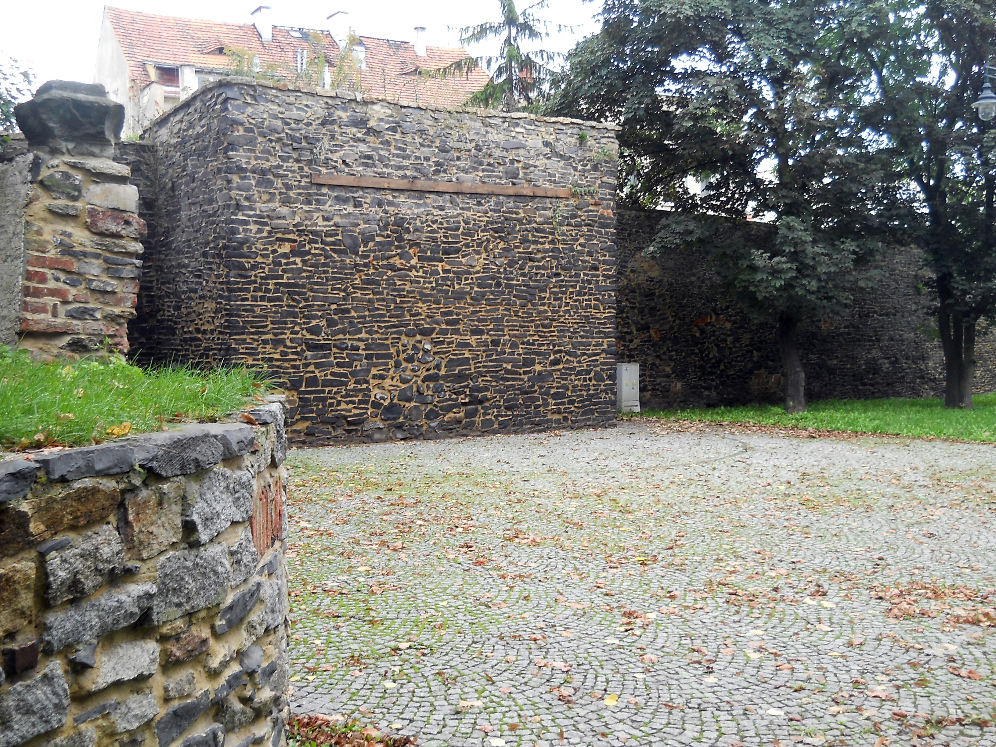 Strzegom,fragment dawnych murów obronnych